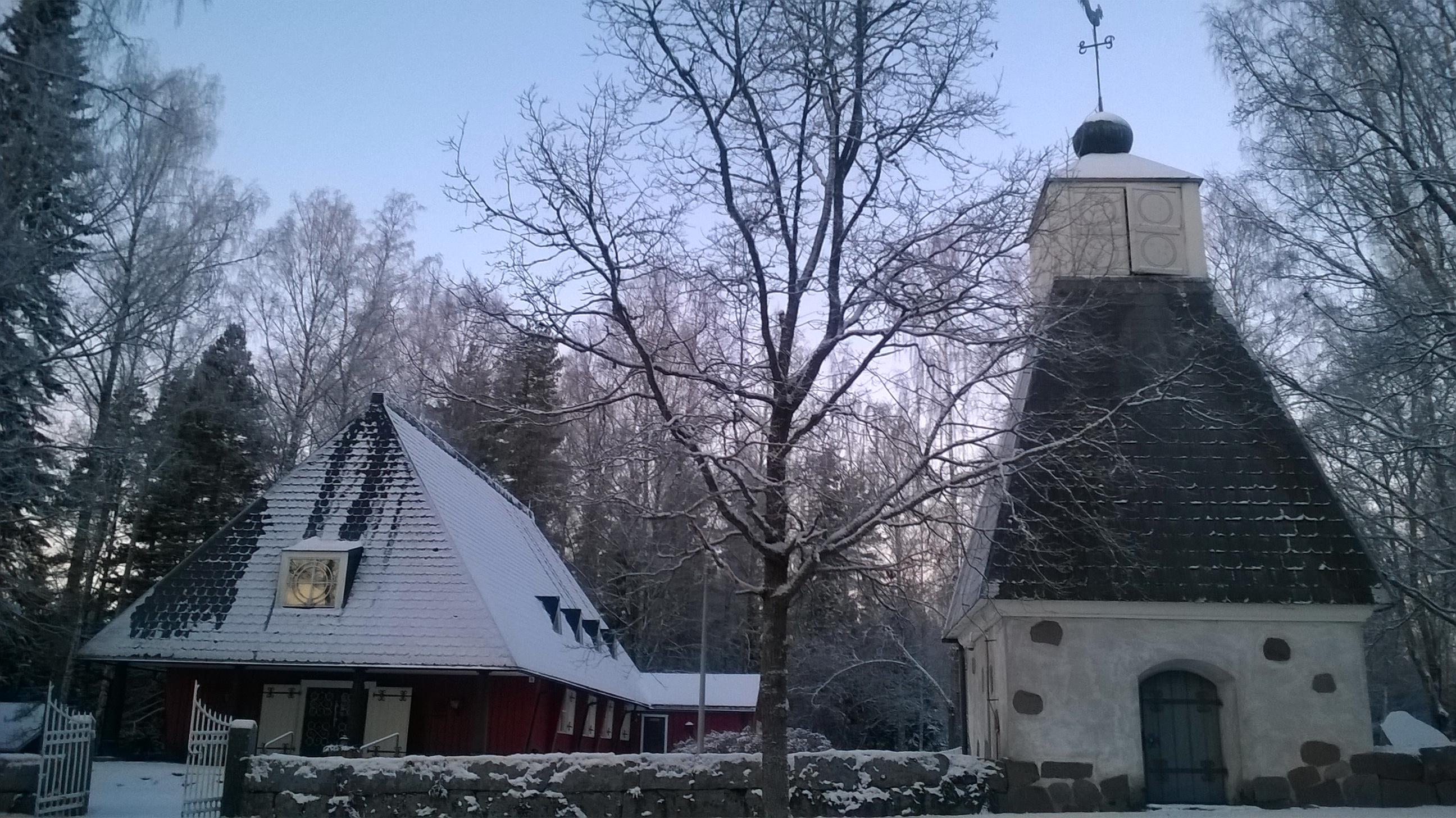 Nuijamaan kirkko; kirkkorakennus Lappeenrannassa